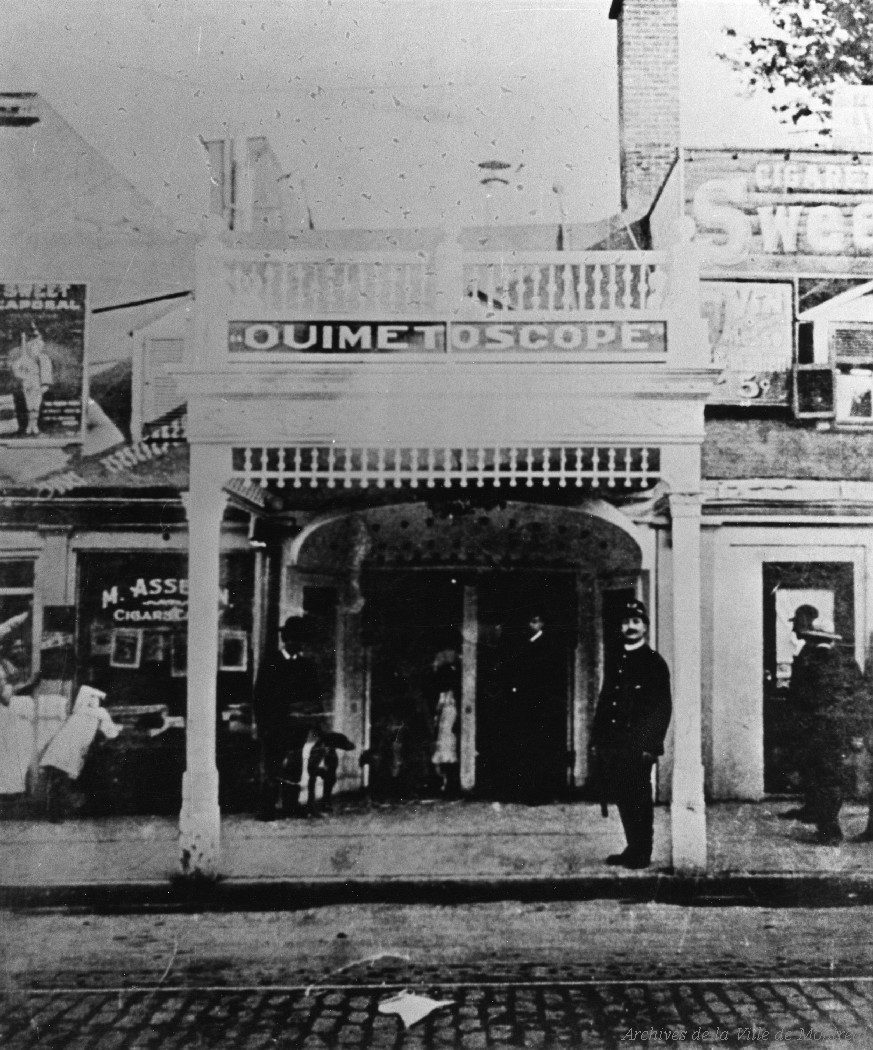 Première salle du Ouimetoscope en 1906. ( Collection Cinémathèque québécoise. Fonds Léon H. Bélanger.)